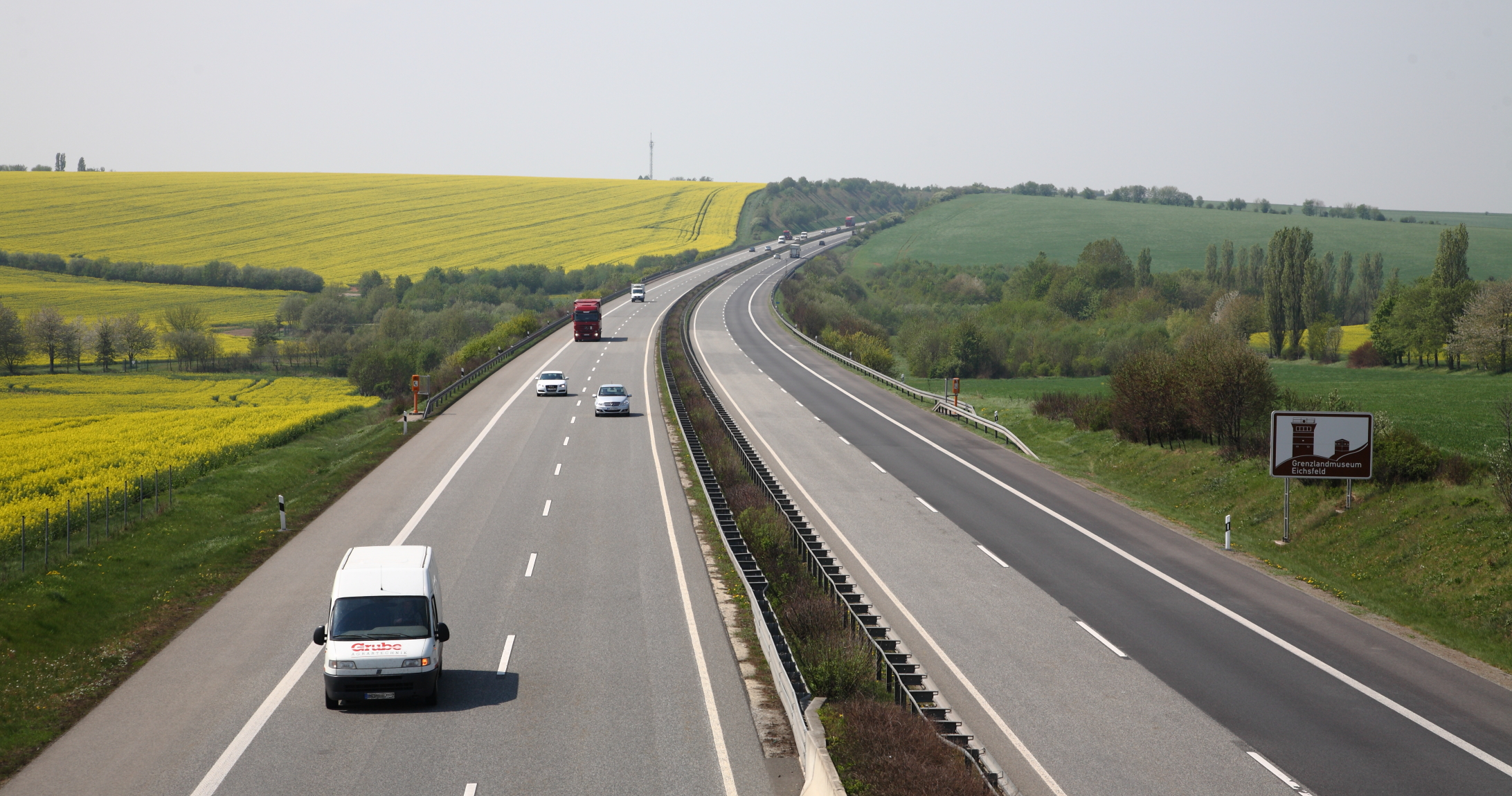 Die Autobahn A38 zwischen Kirchworbis und Gernrode (Landkreis Eichsfeld in Thüringen).